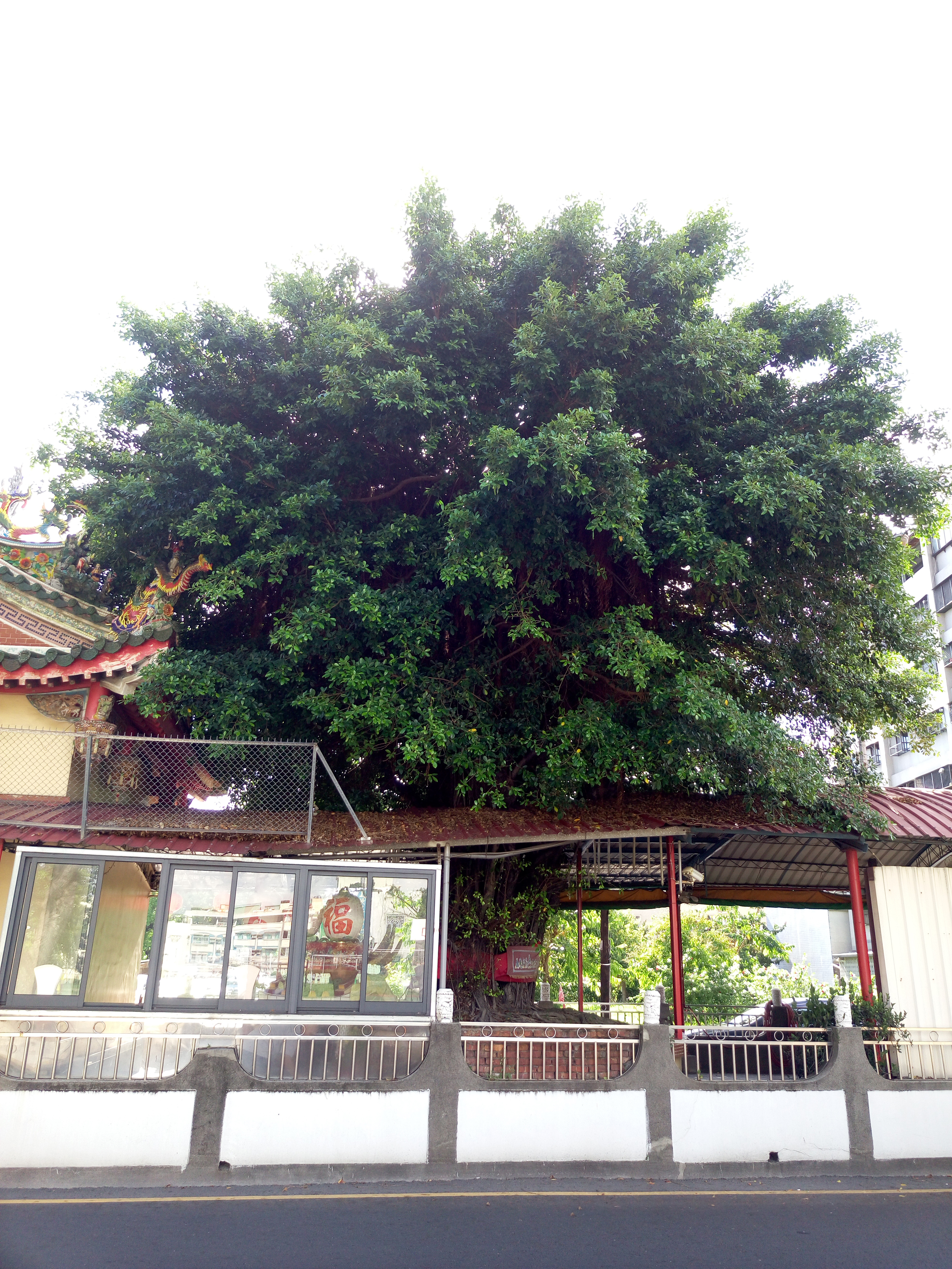 臺灣高雄市前鎮區千秋府 福樹公